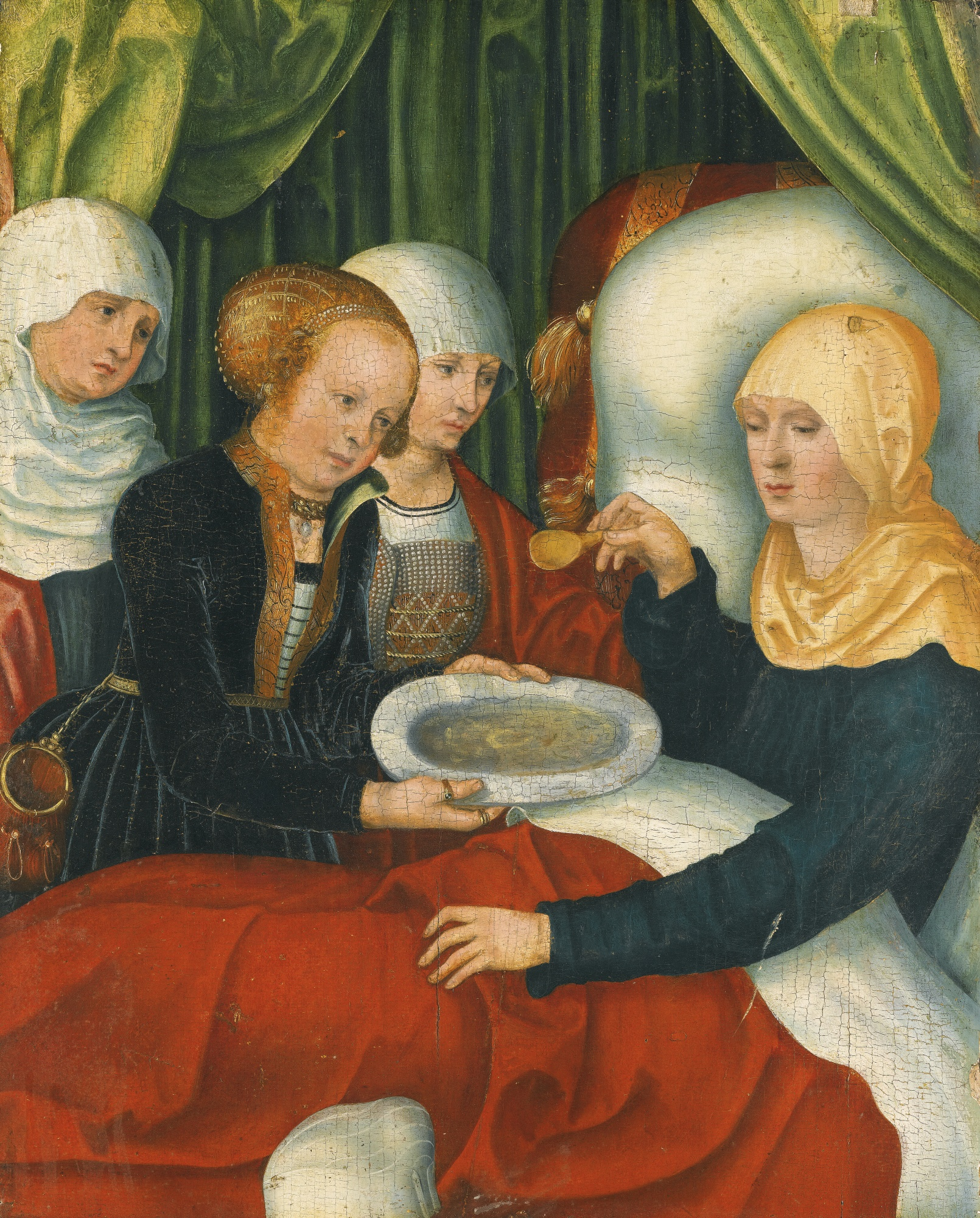 Fragment